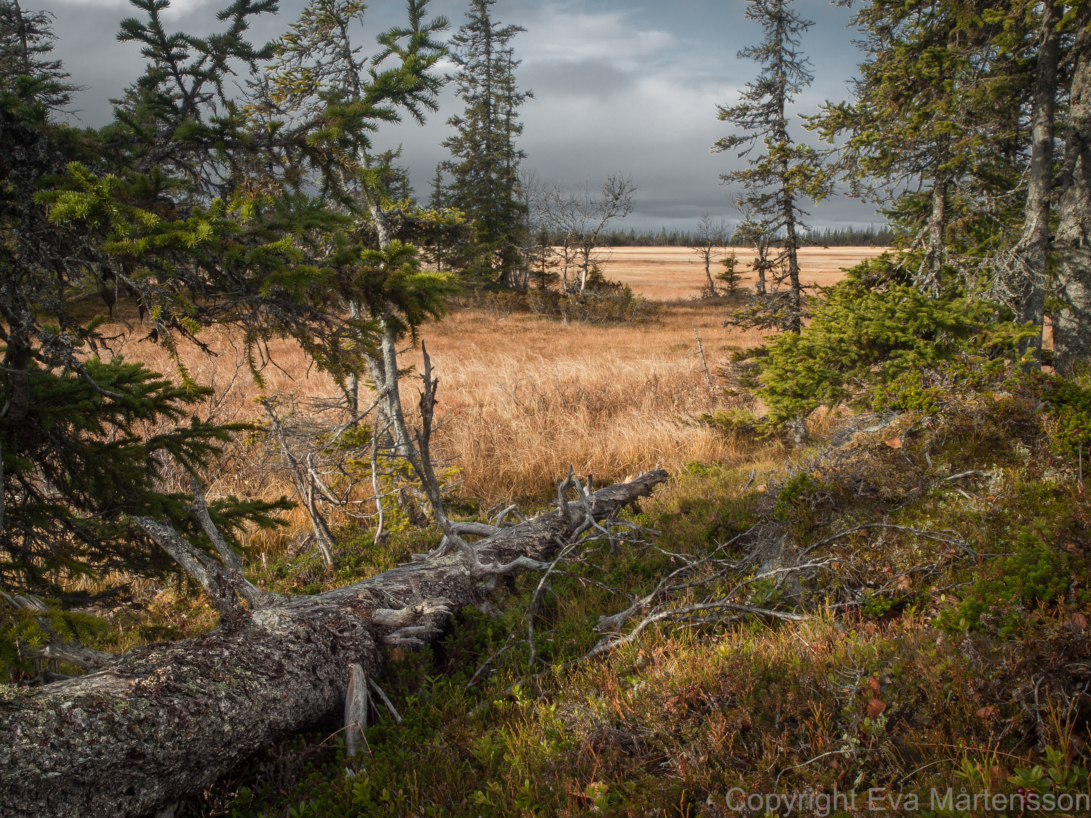 Mosagubbmyran wetlands in Blaikfjället